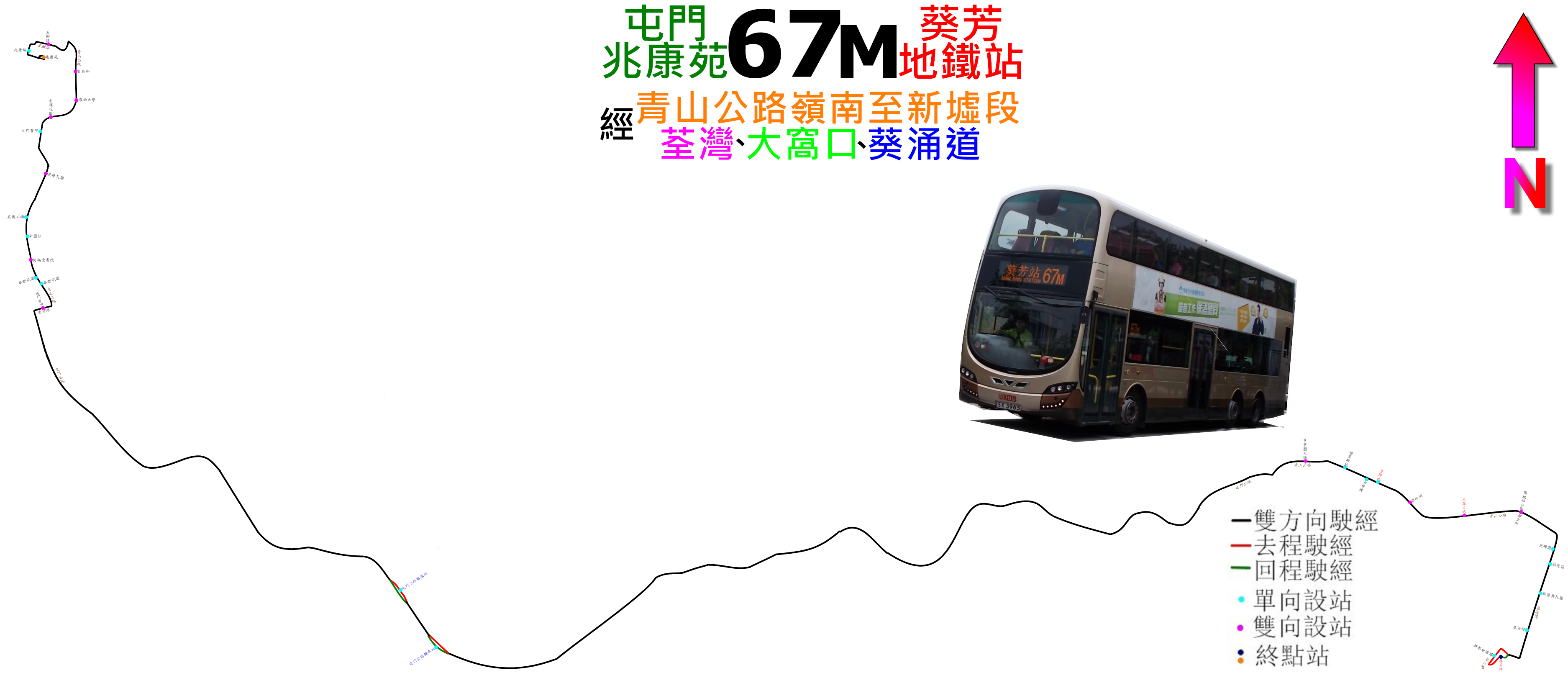 中文（香港）: 九巴67M線的走線圖